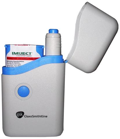 imiject